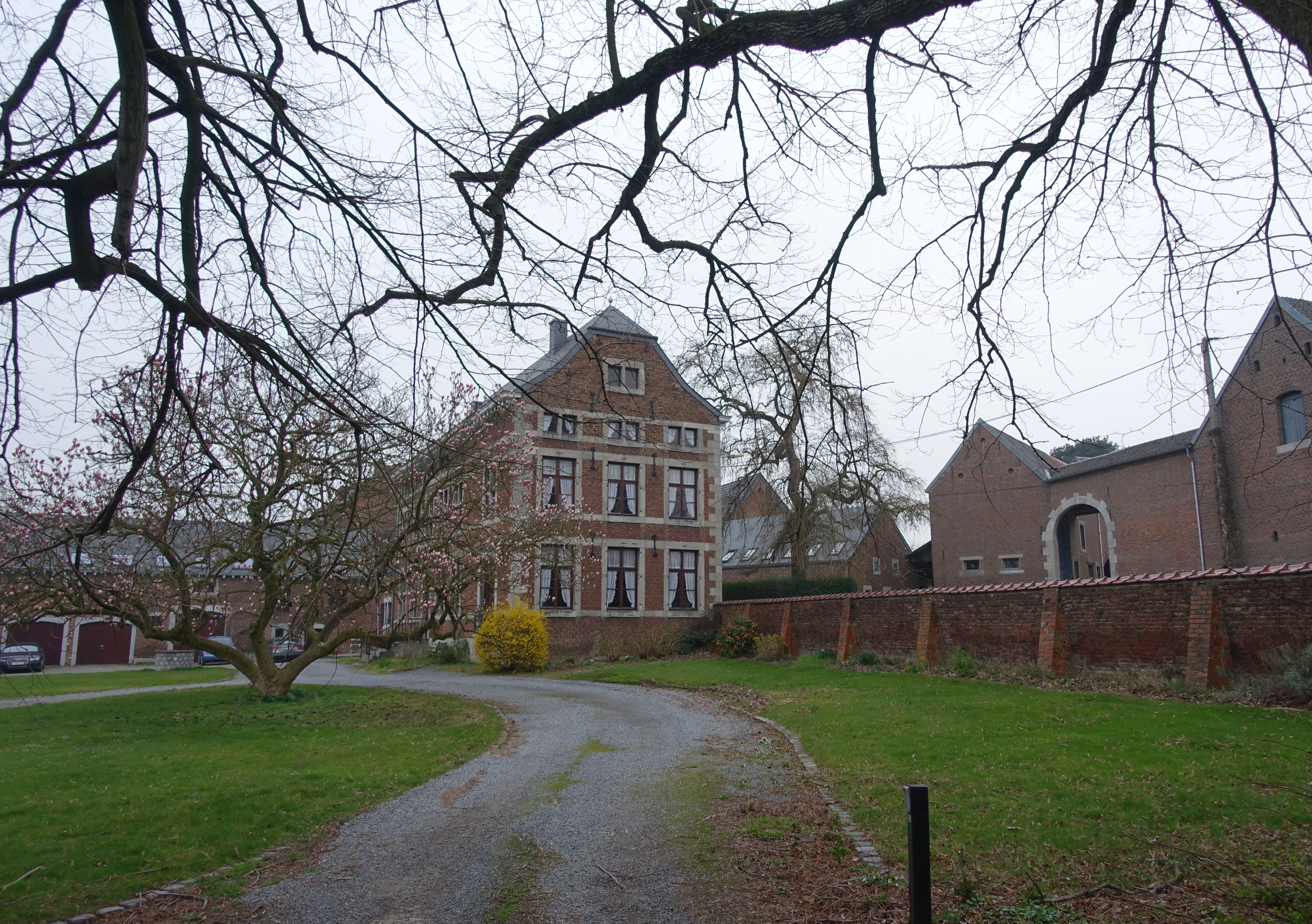 Kasteel-boerderij Là-Bas